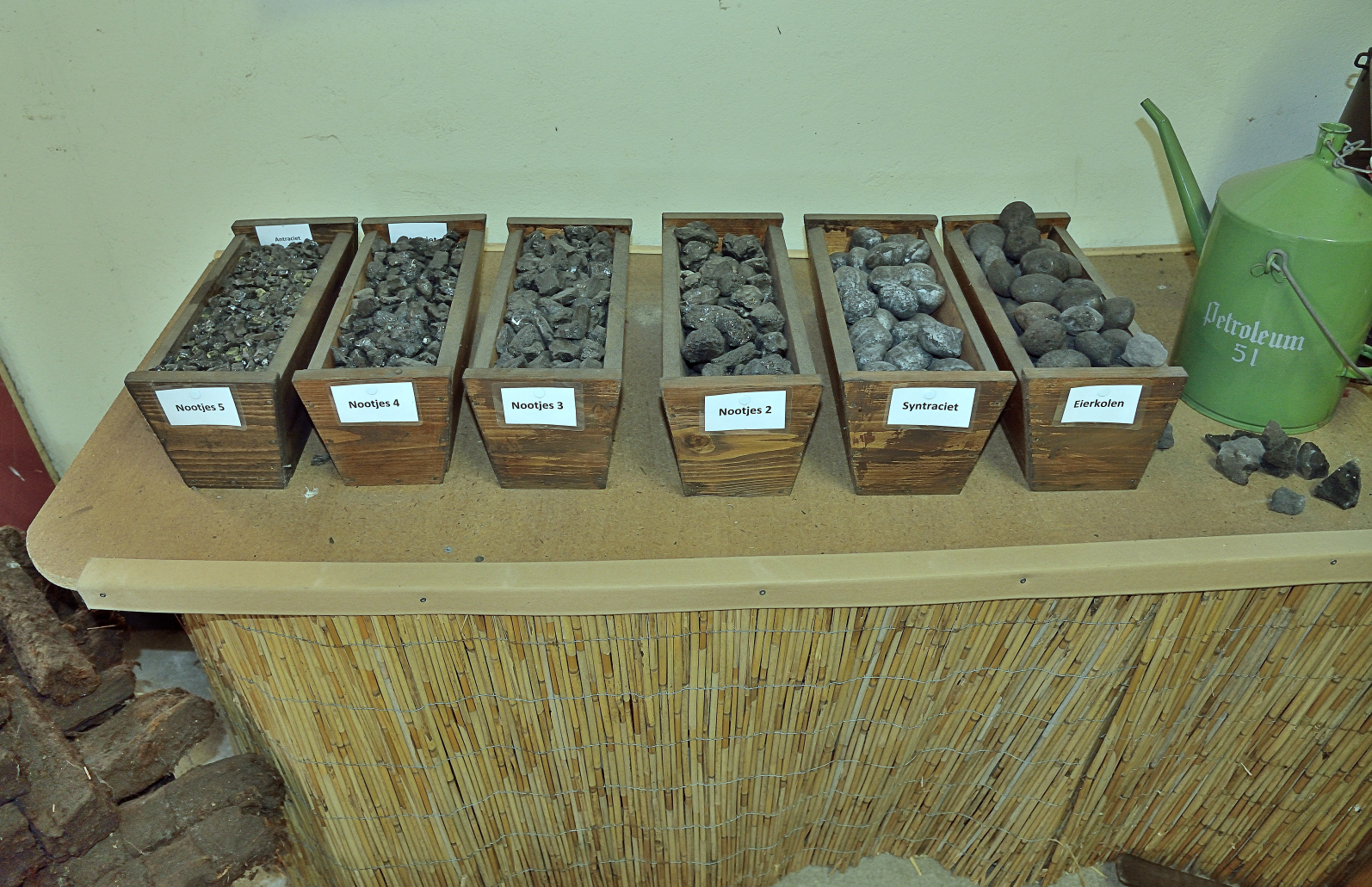 Van antraciet tot eierkolen op molen Grenszicht, Emmer Compascuum